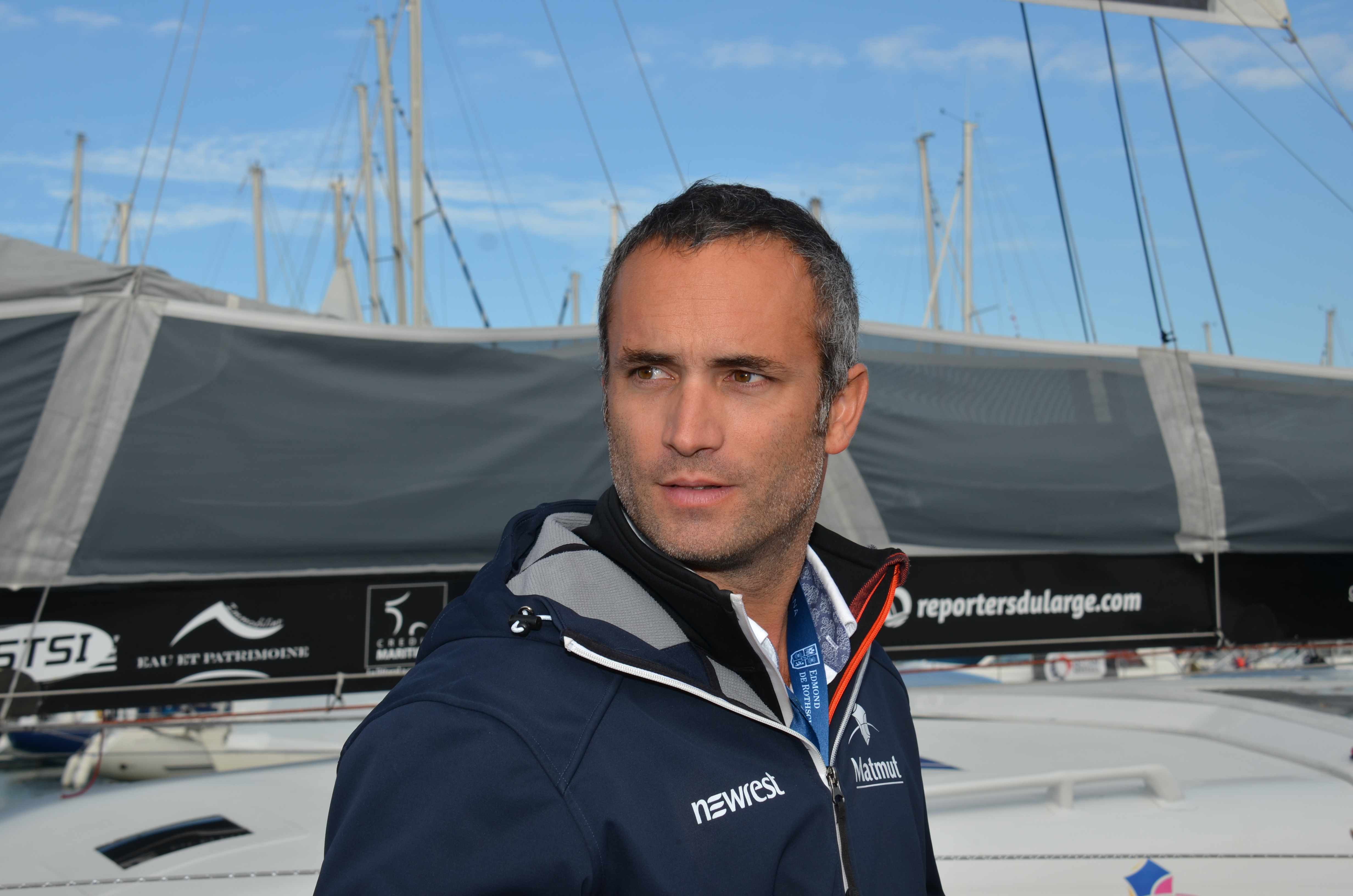 Fabrice Amedeo au départ du Vendée Globe 2016